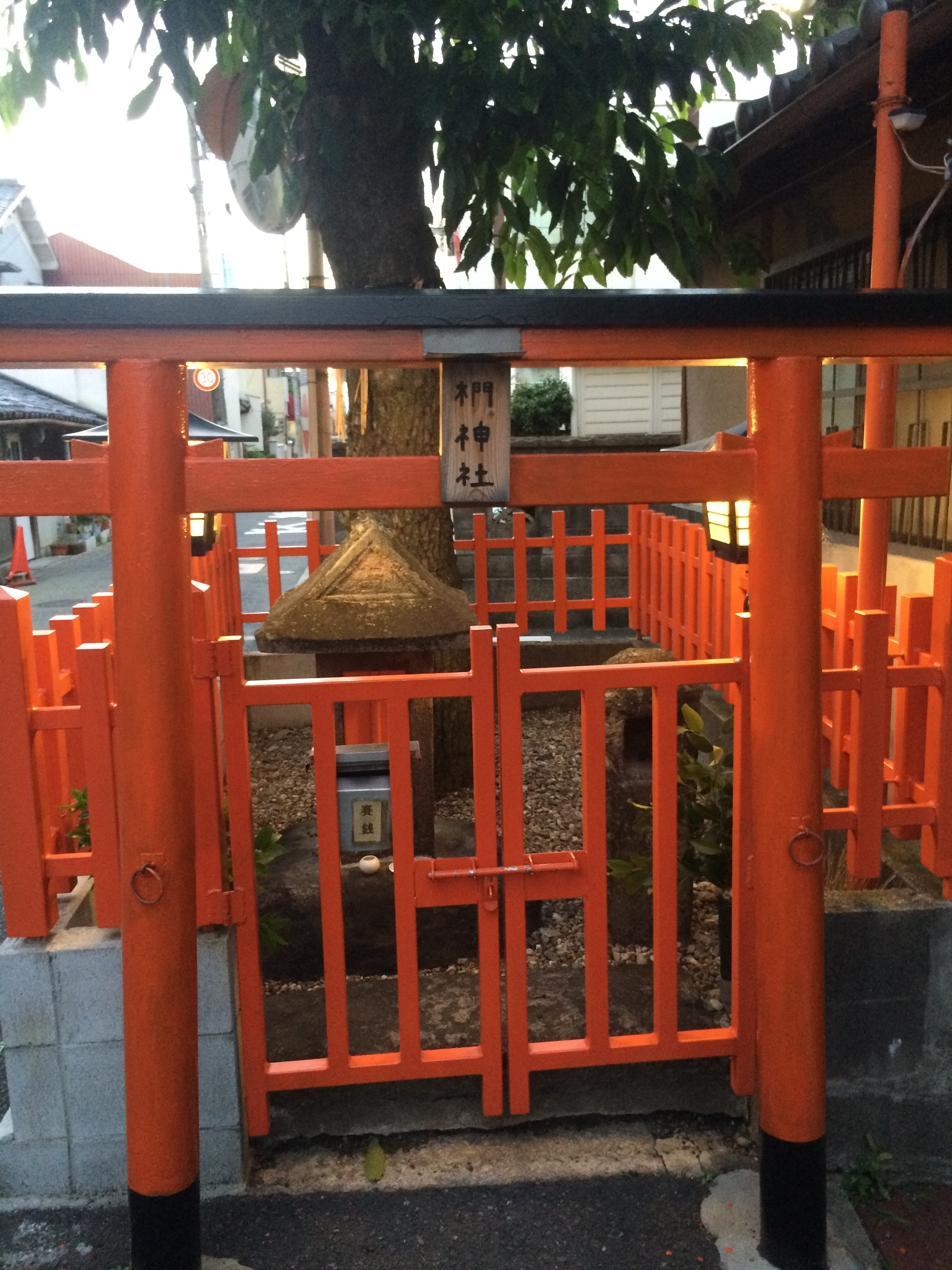 椚神社、奈良、京終地区